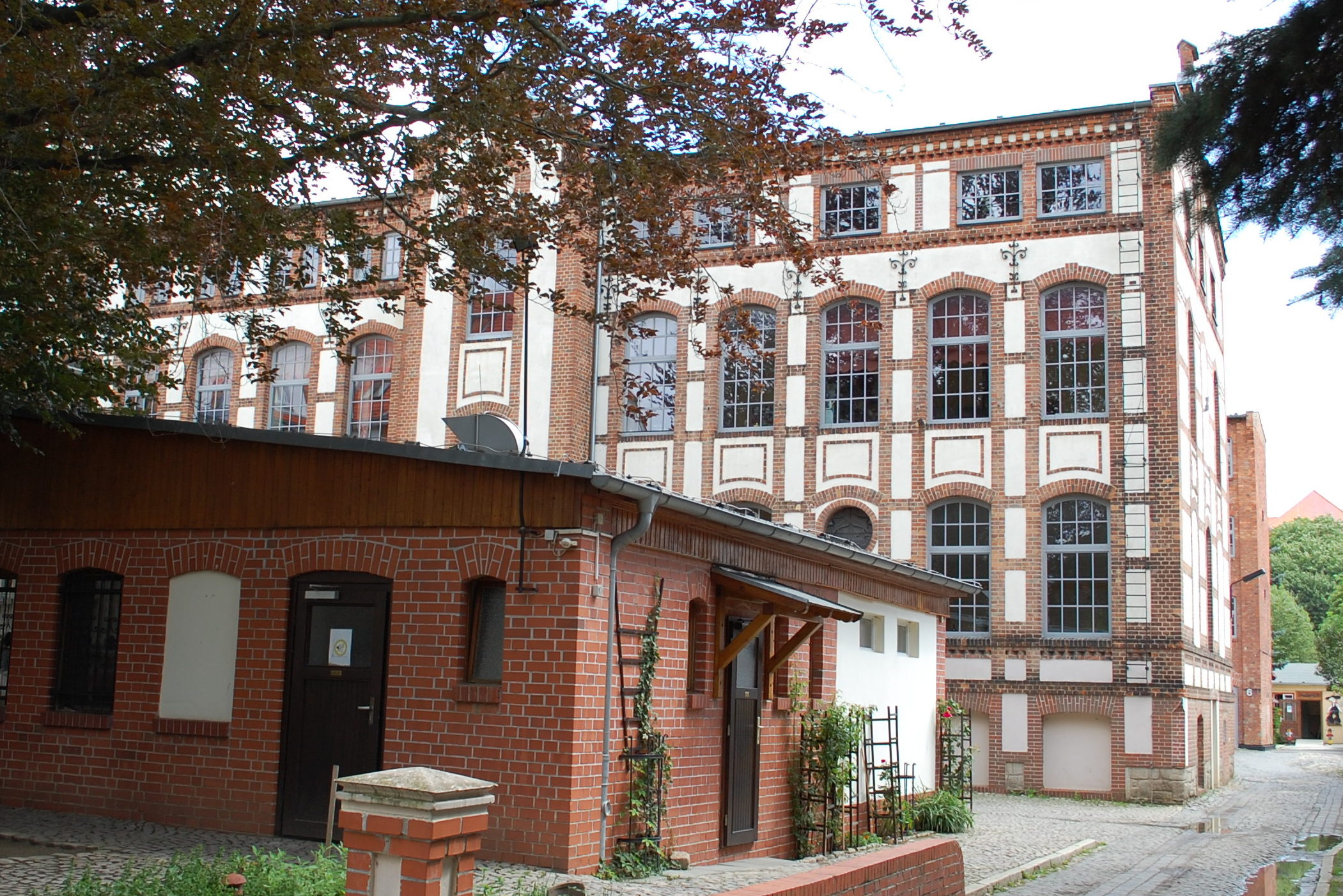 Fabrik Rambergweg 23 in Quedlinburg